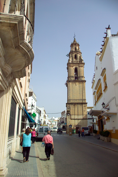 Torre Barroca de San Francisco, Bujalance